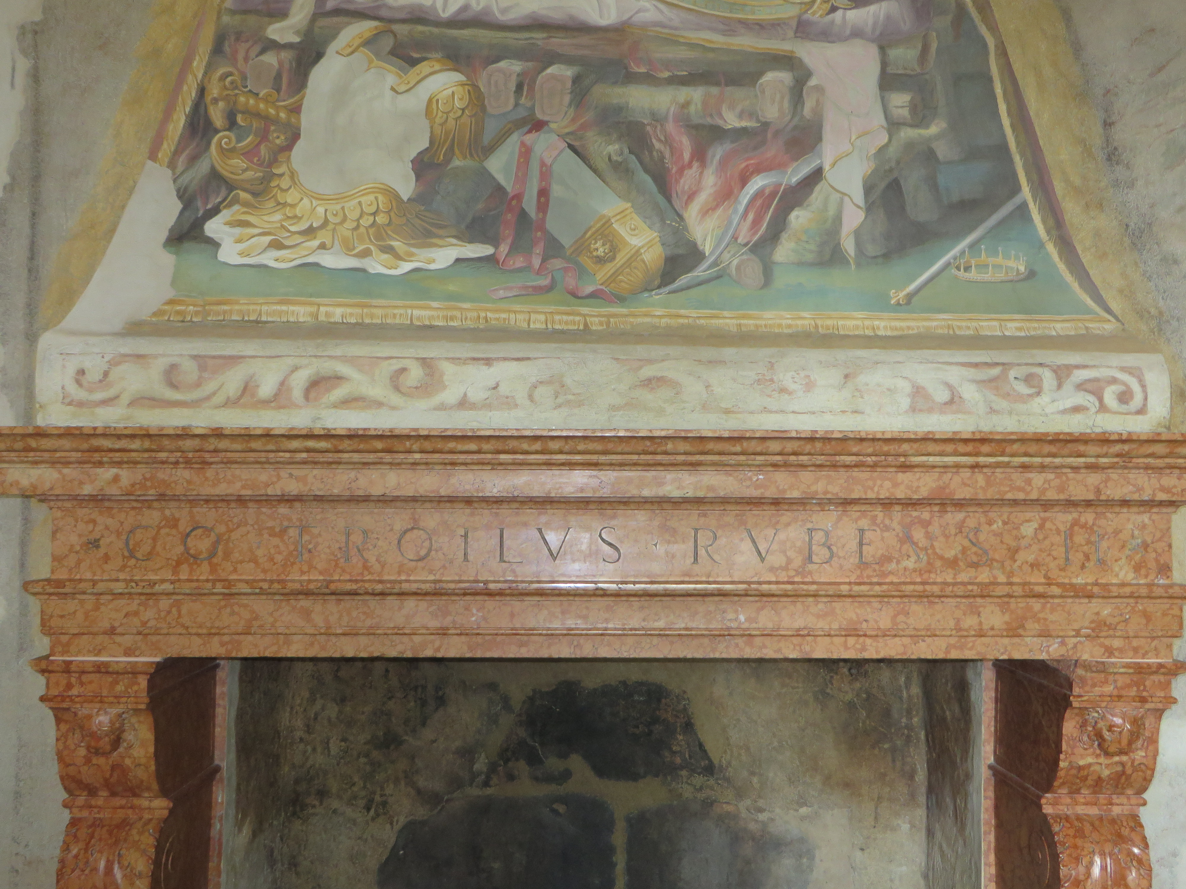 Castle San Secondo